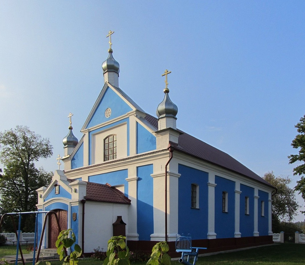 Малыя Шчытнікі. Царква